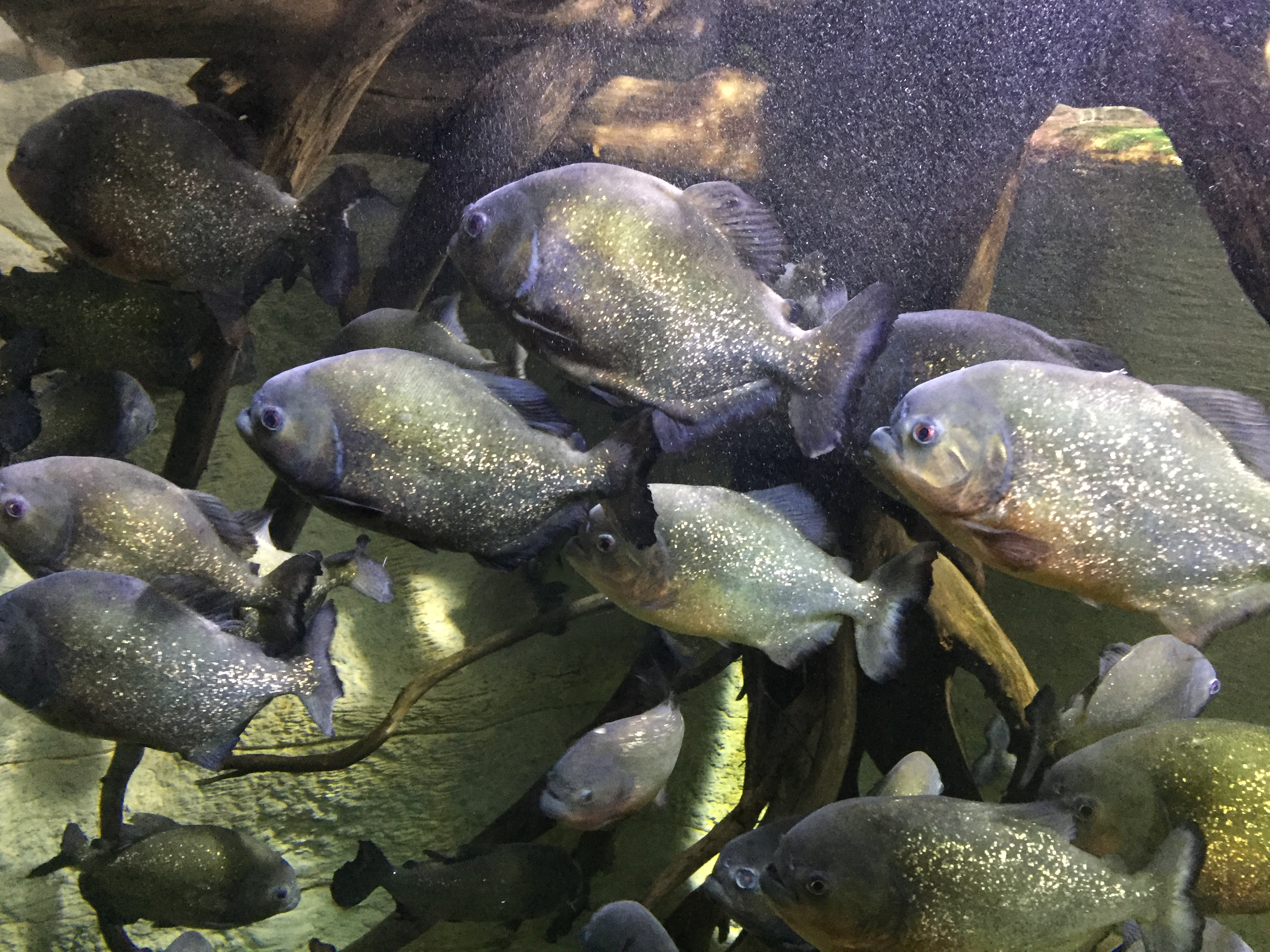 Pirañas (Pygocentrus nattereri) en el parque Pairi Daiza (Brugelette, Bélgica).